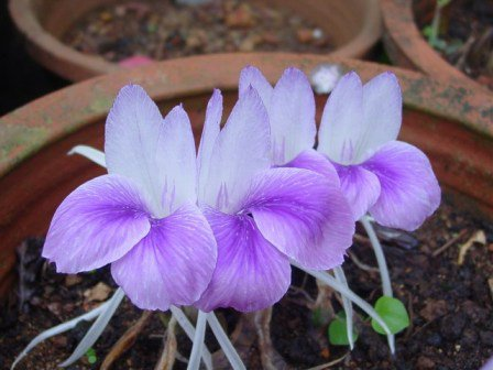 Flor de Kaempferia Rotunda